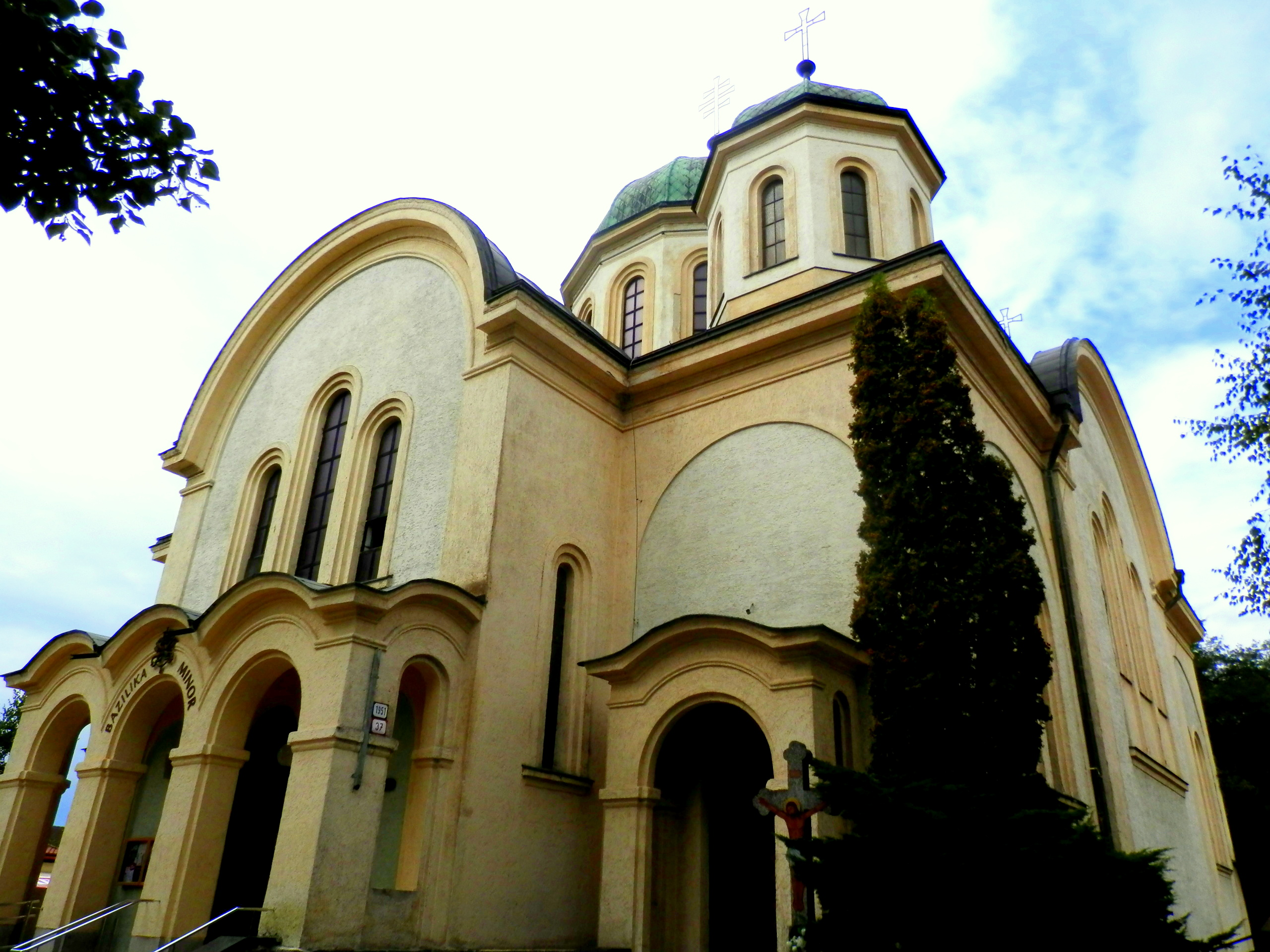 Gréckokatolícky chrám Zoslania sv. Ducha v neobyzantskom slohu bol postavený pri kláštore redemptoristov v rokoch 1934 - 1935. V roku 2012 bol povýšený na Baziliku Minor. Historická pamiatka sa nachádza na Masarykovej ulici č.37. mesto Michalovce.